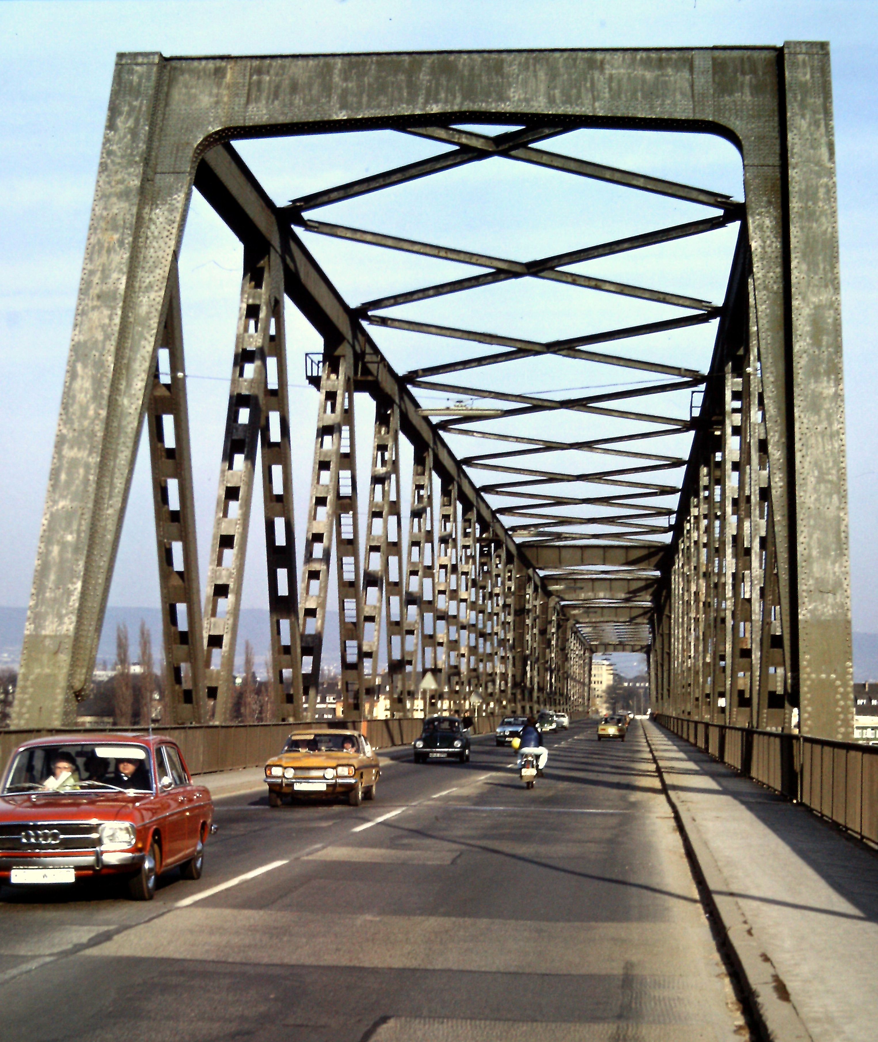 Alte Neuwieder Brücke 1975, Vorgängerbrücke der heutigen Raiffeisenbrücke